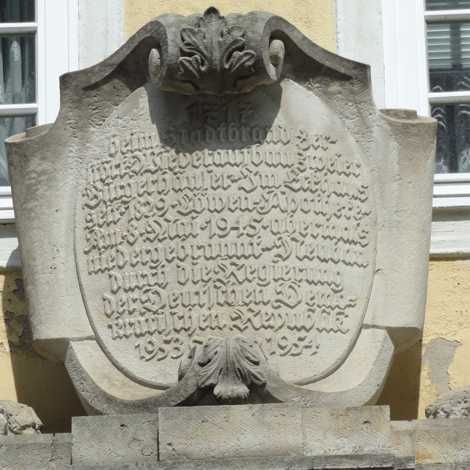 Wappenschild über dem Eingang des Eckhauses Obermarkt/Fleischerstraße